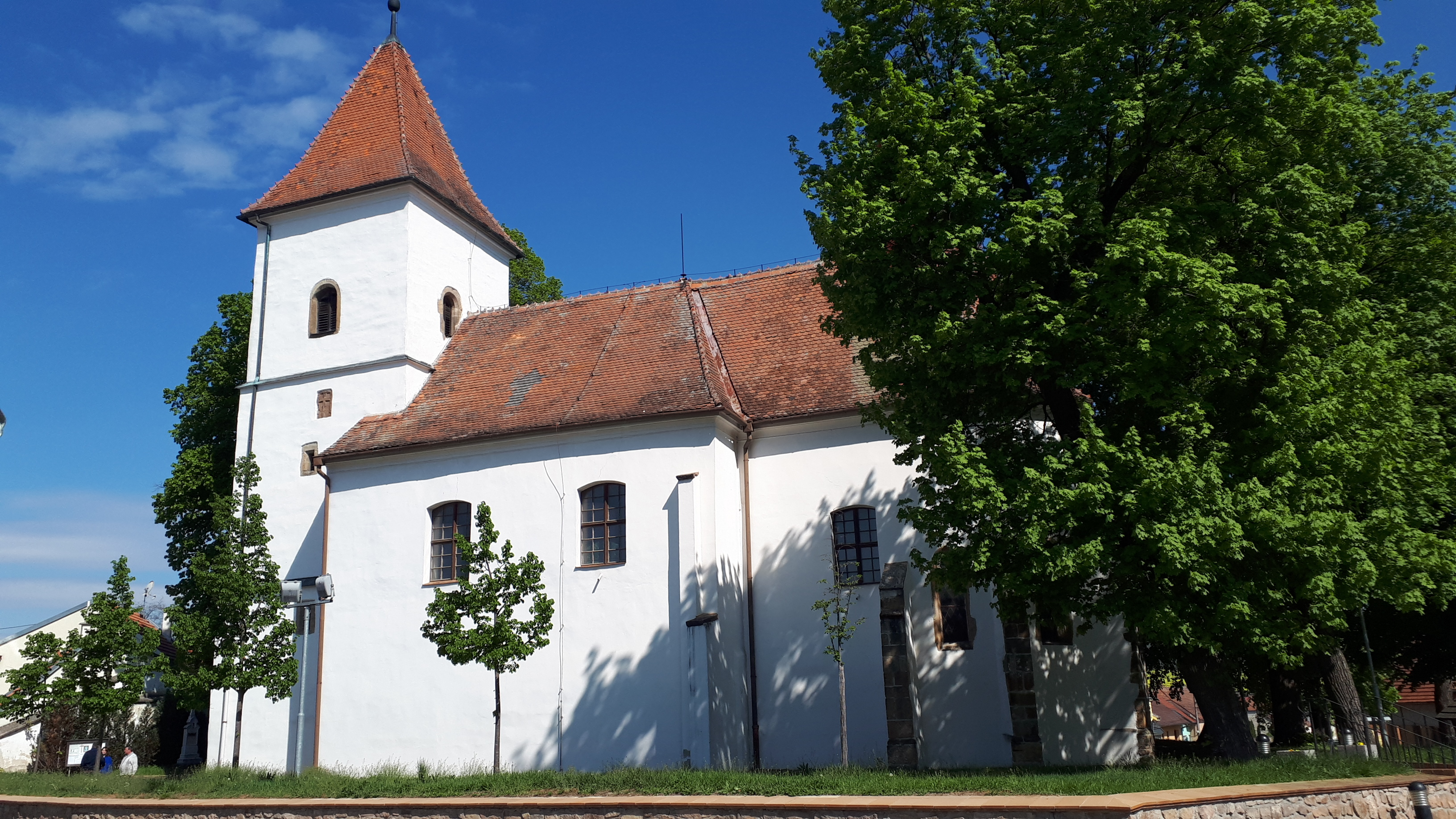 Drásov